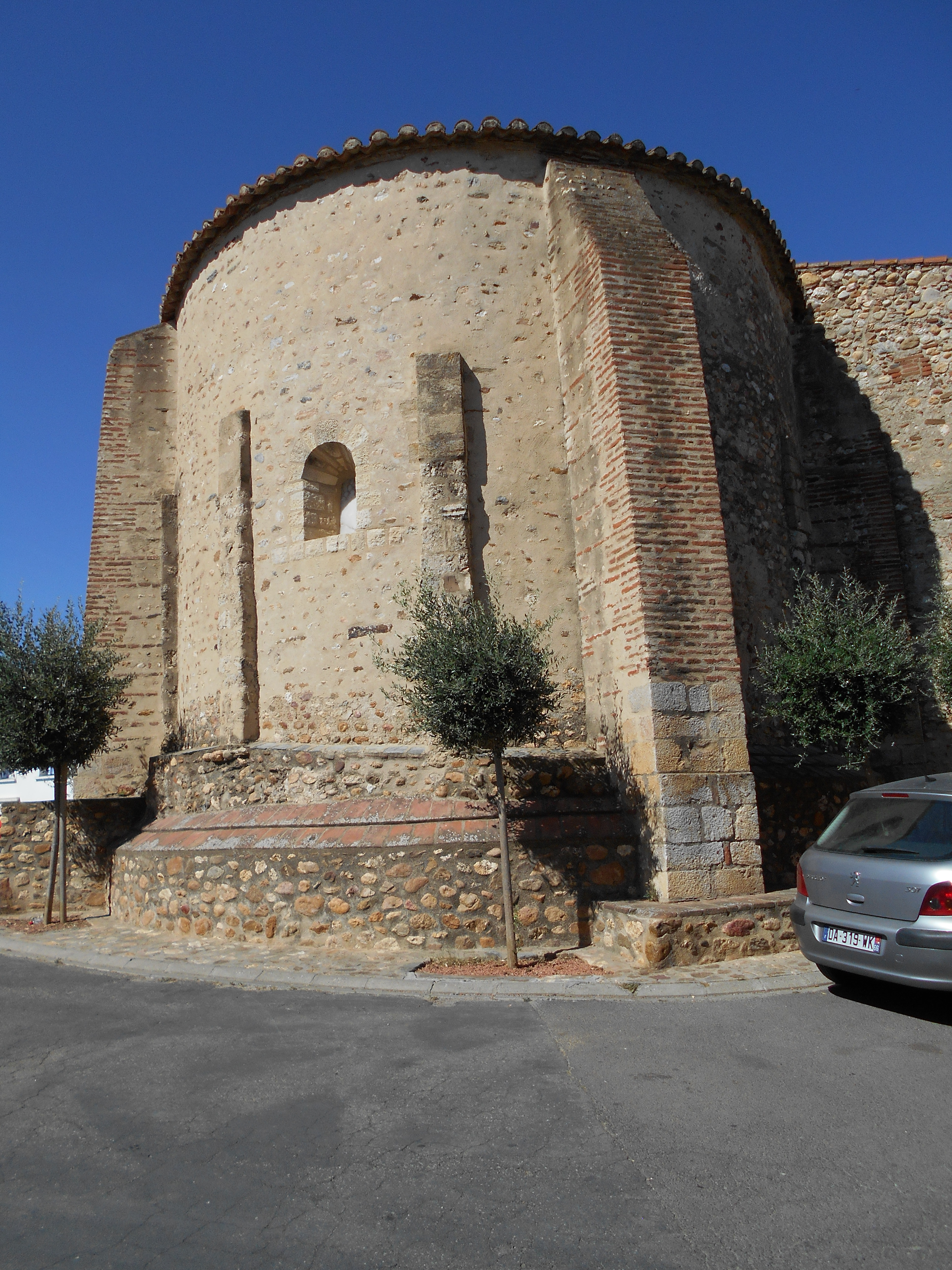 L'absis